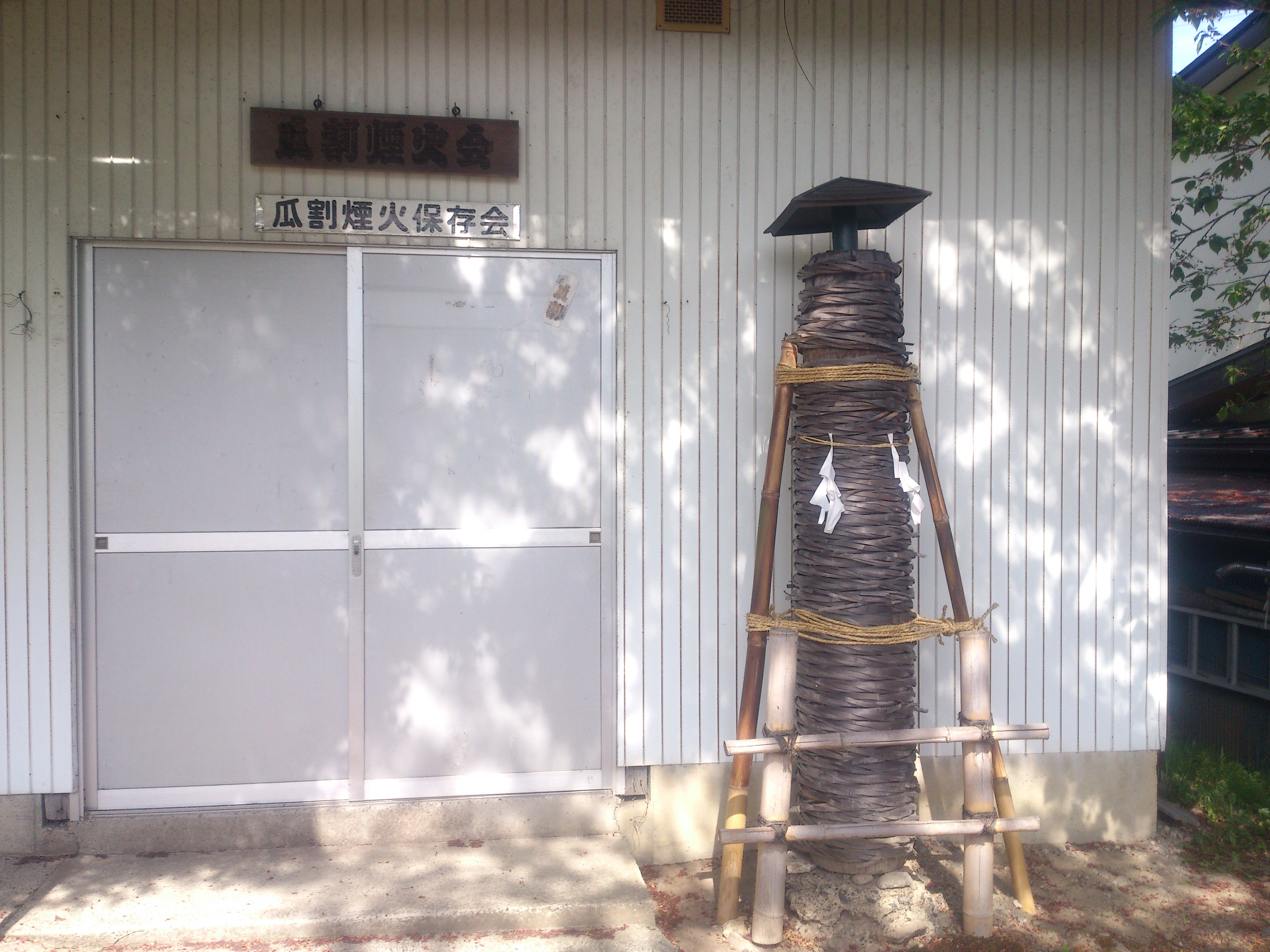 瓜割煙火倉庫（長野県長野市新諏訪二丁目）